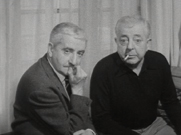 Cette image est issue du film Mon frère Jacques par Pierre Prévert dont je suis la réalisatrice. Je suis la fille et seule ayant droit de Pierre Prévert. Licence CC-BY-SA Summary Description : Pierre Prévert (à gauche) et Jacques Prévert (à droite) s'adressent aux spectateurs regardant le film dans lequel ils apparaissent Source : DVD Mon frère Jacques Auteur : Pierre Prévert / Catherine Prévert Date : 1961 Licence